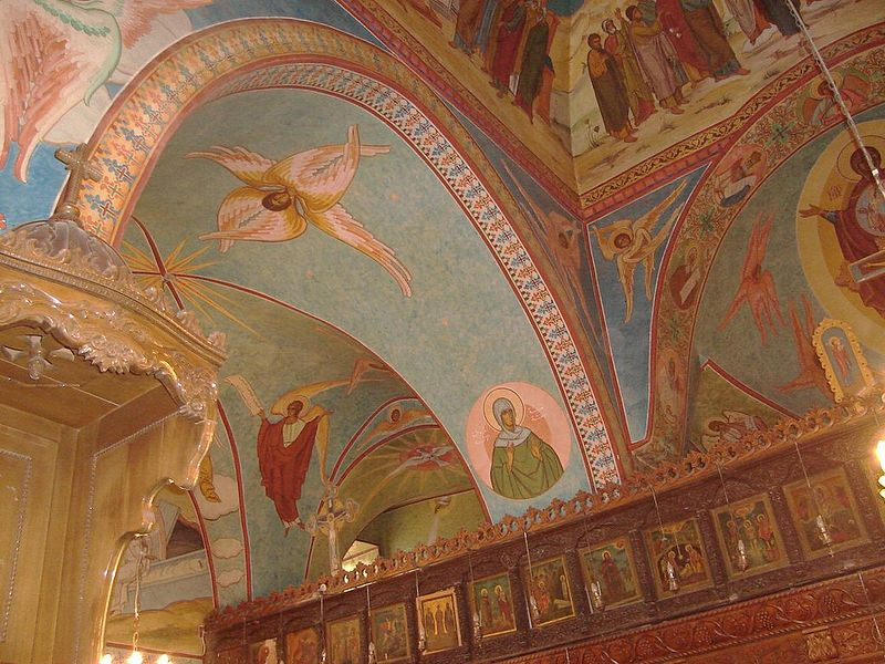 جدارية في كنيسة مار إليان الحمصي، حمص